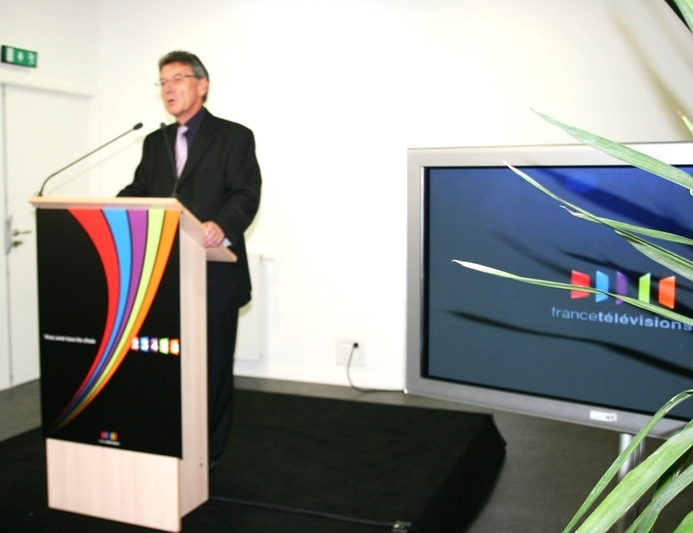 Français